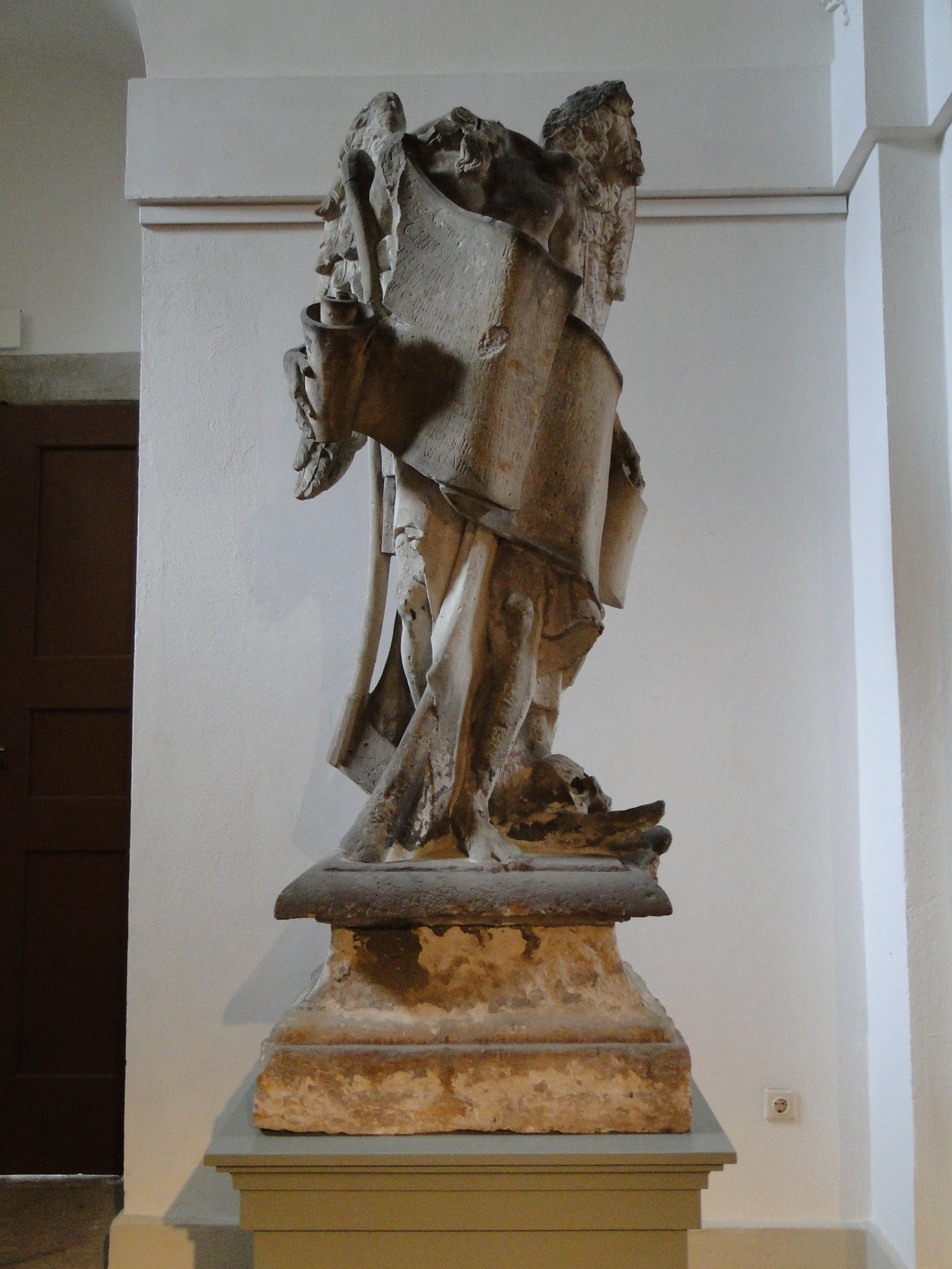 Grabstein Chronos vom Grab Weinlig, ehemals Eliasfriedhof, heute Palais im Großen Garten